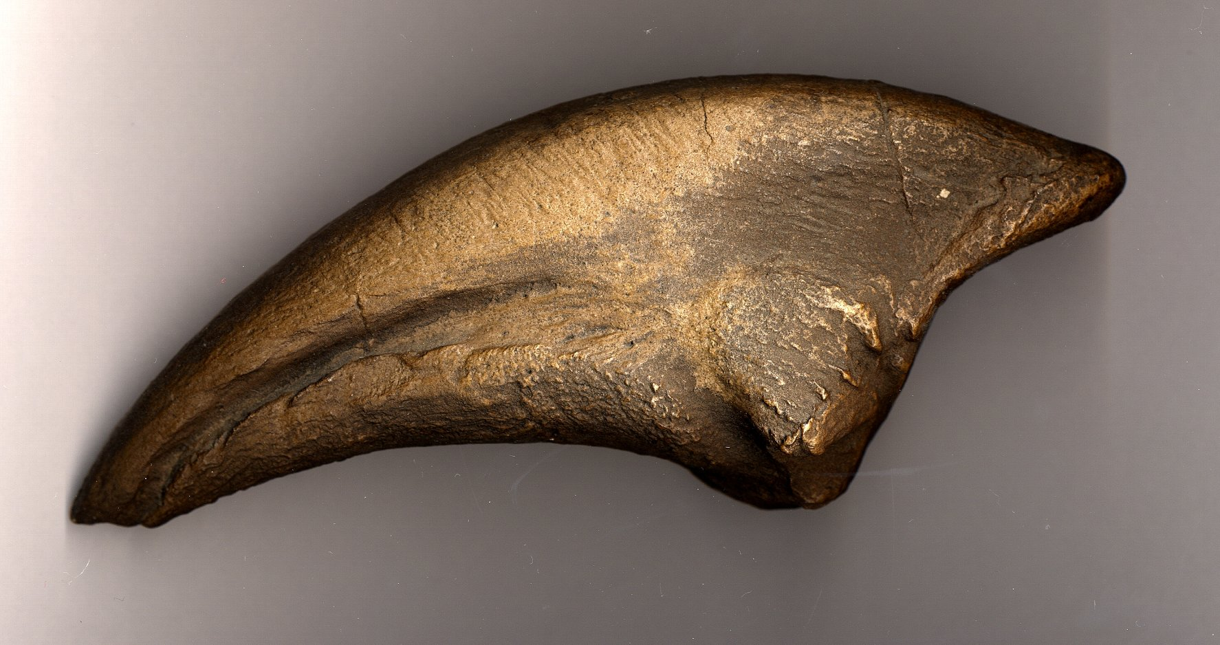 Allosaurus fragilis claw